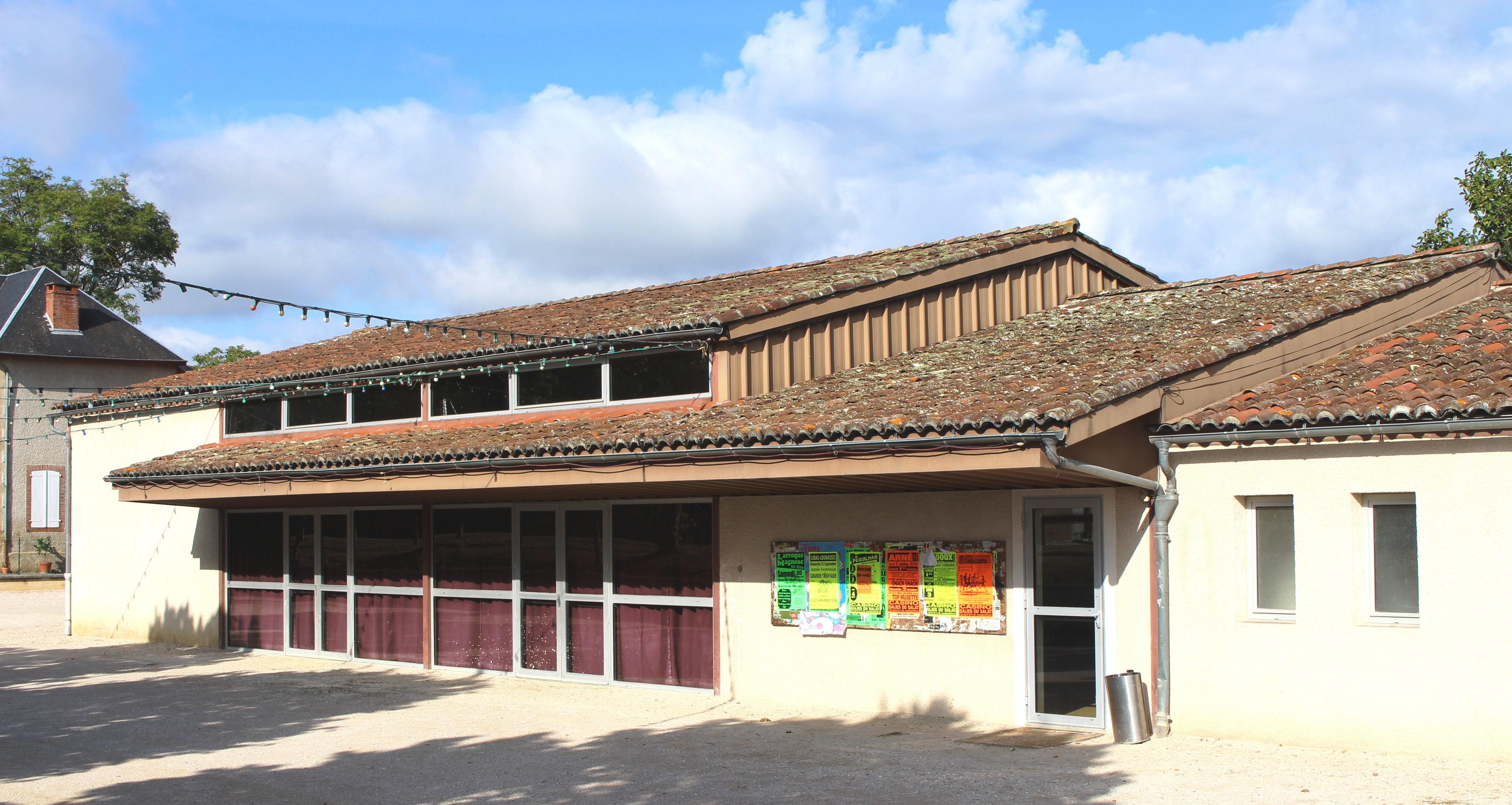 Salle des fêtes de Thermes-Magnoac (Hautes-Pyrénées)